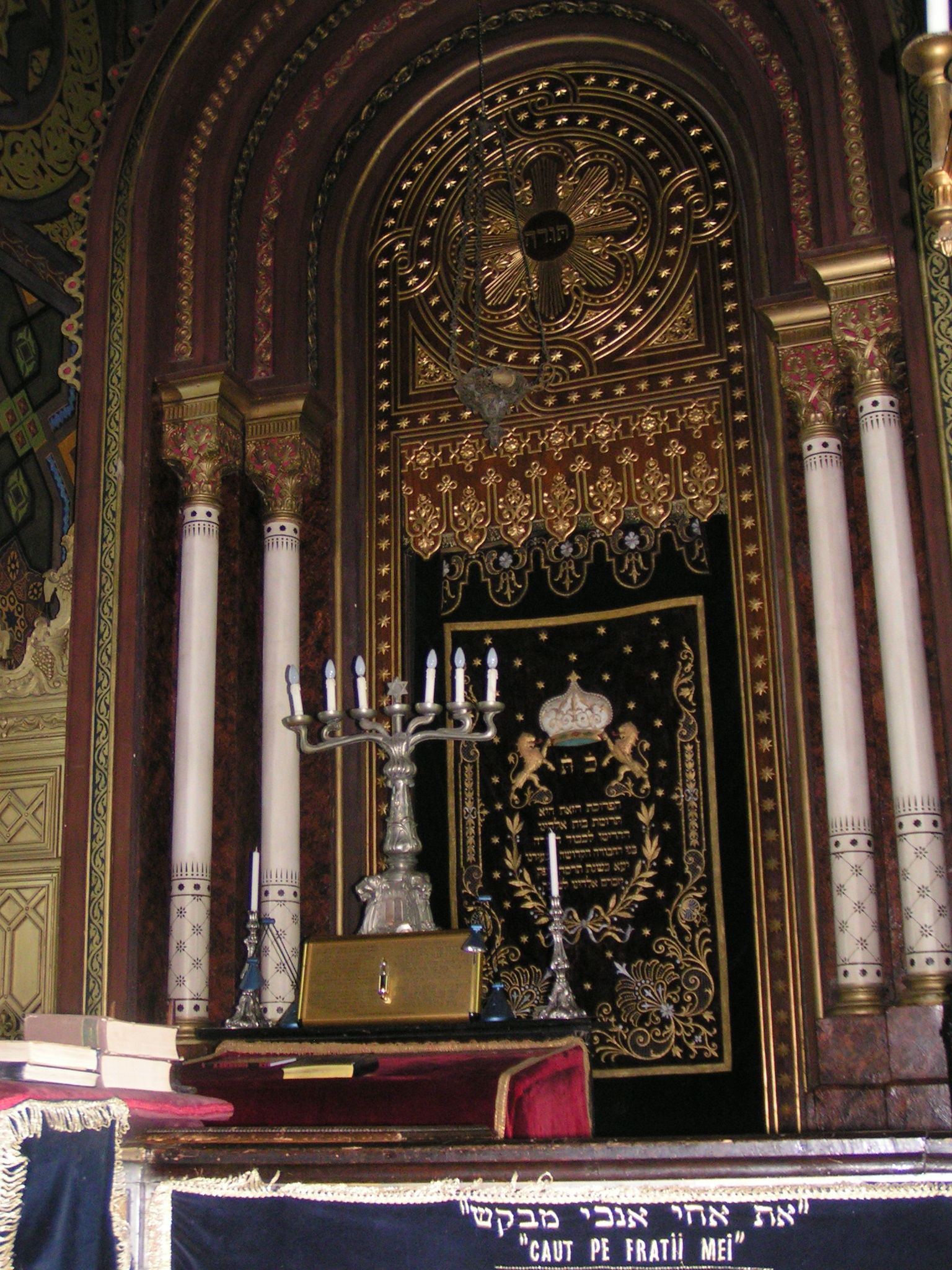 הבימה וארון הקודש בהיכל הקורל בבוקרשט